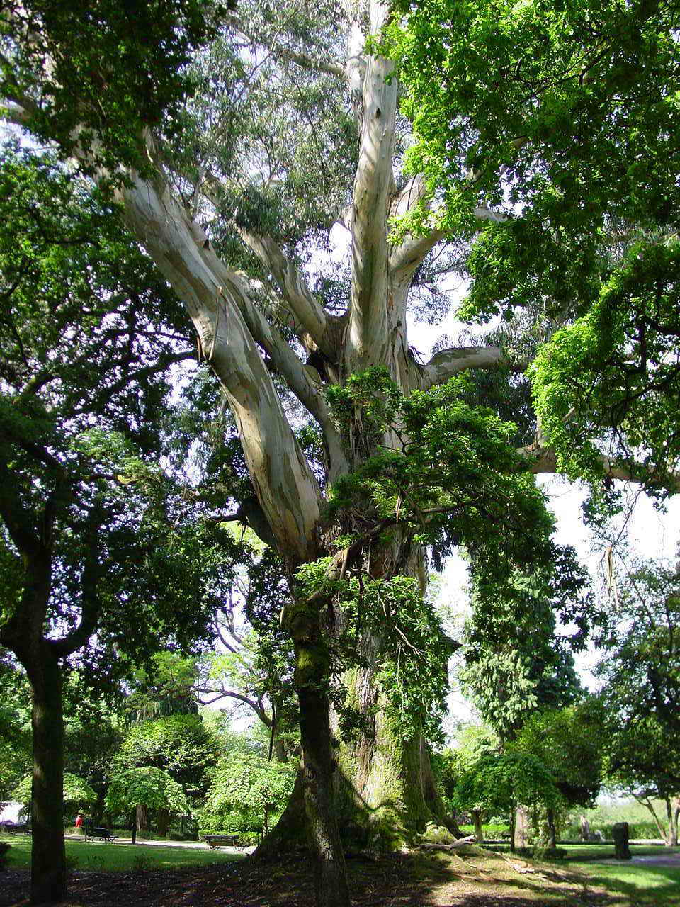 Foto tirada cunha Nikon E8800